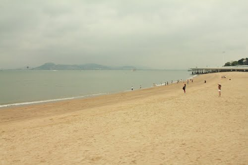 厦门环岛路的沙滩